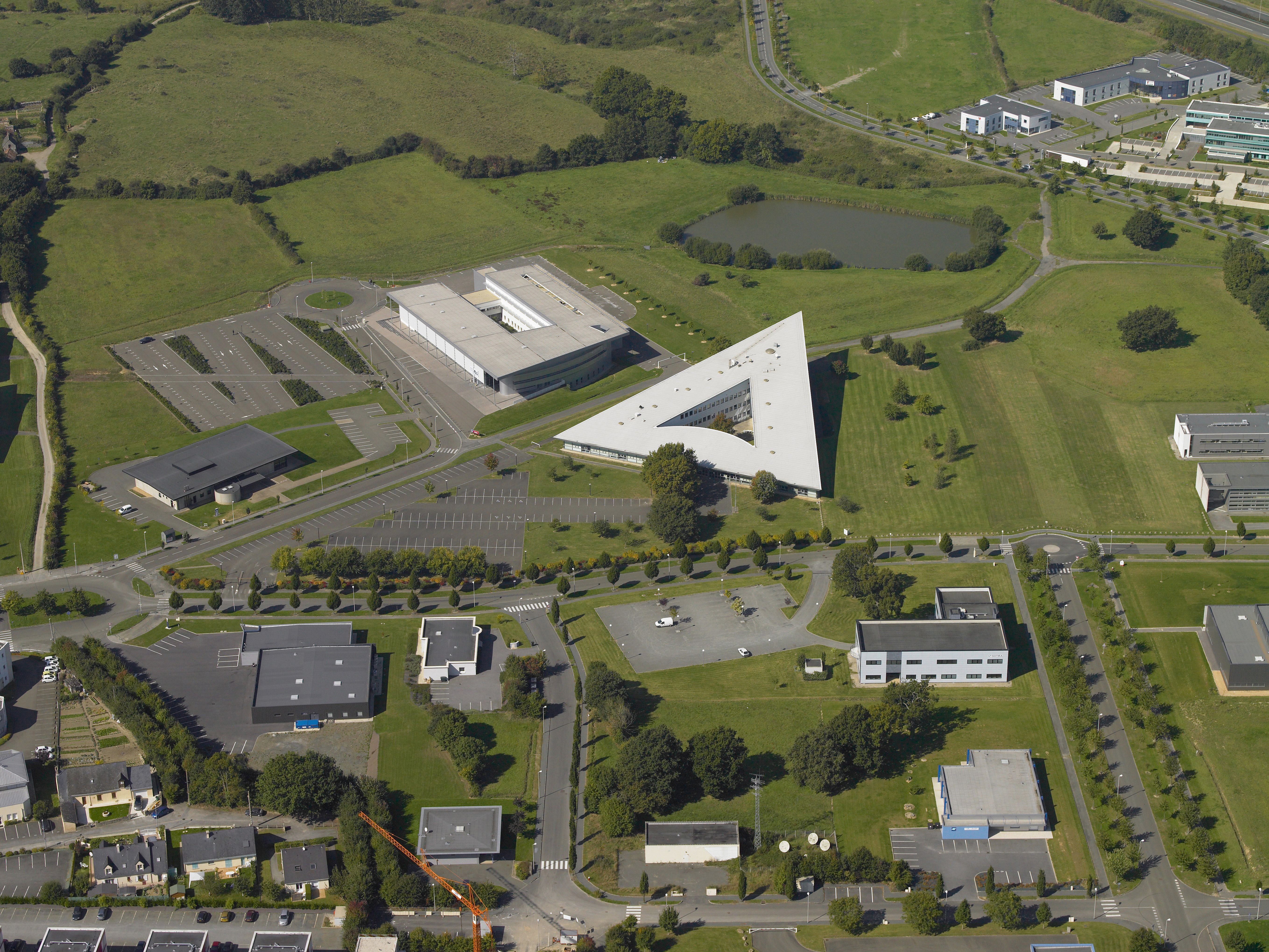 T081194.jpg